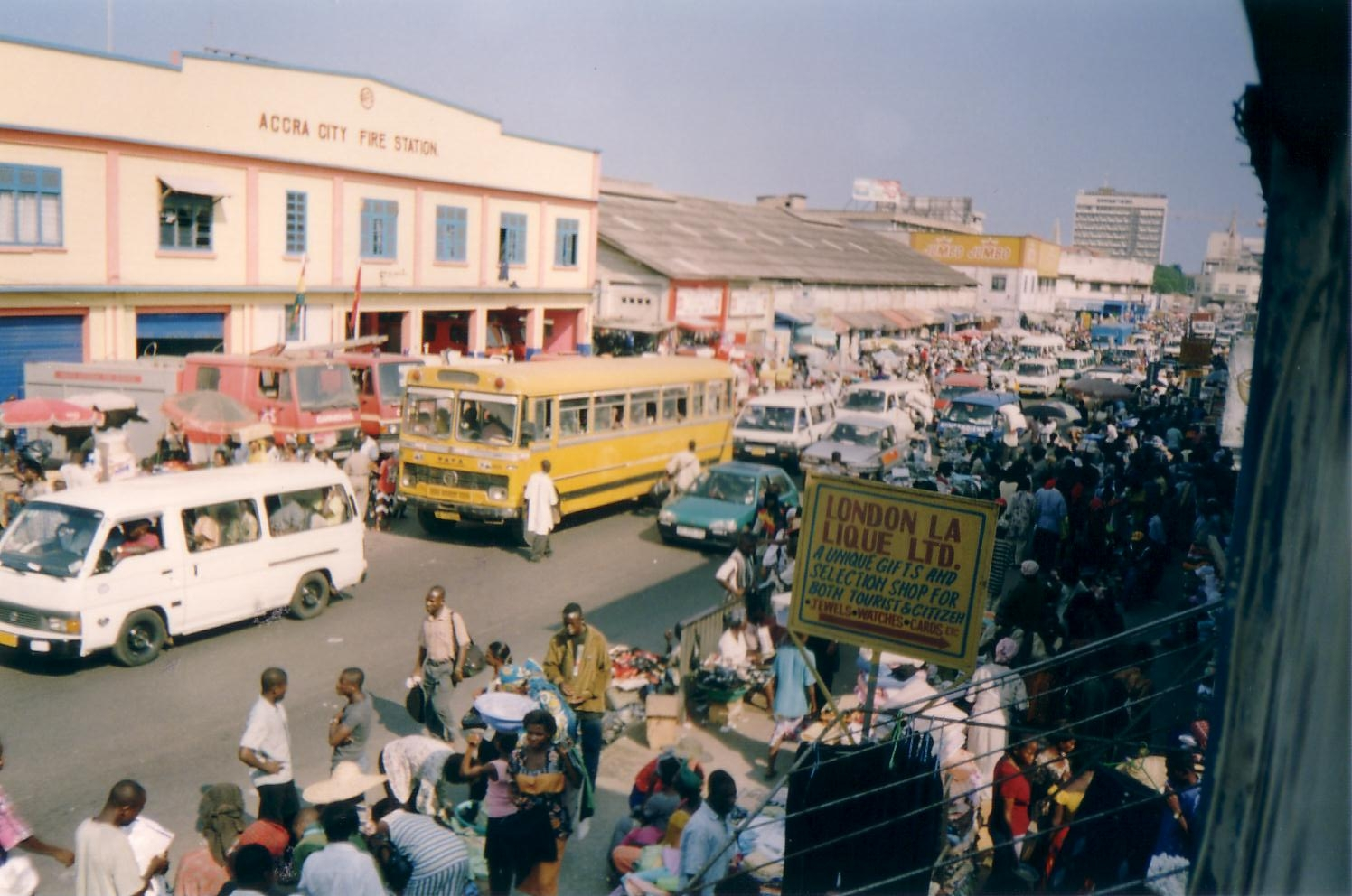 Hauptverkehrsstraße in der Nähe des Makola Market